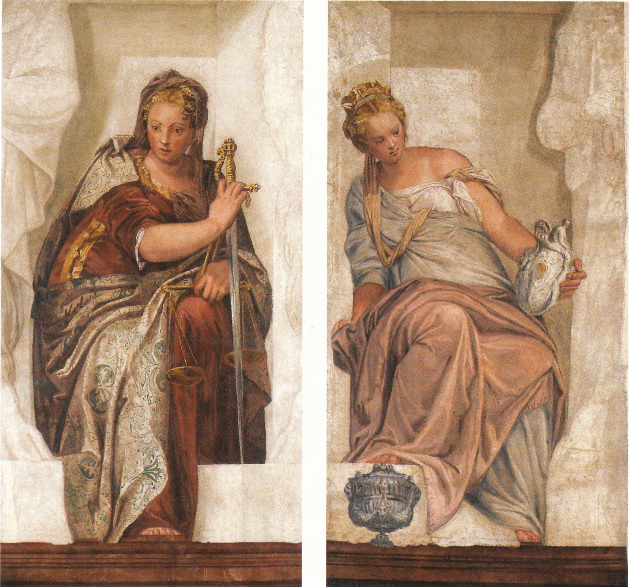 Sacrestia del Duomo di Castelfranco Veneto